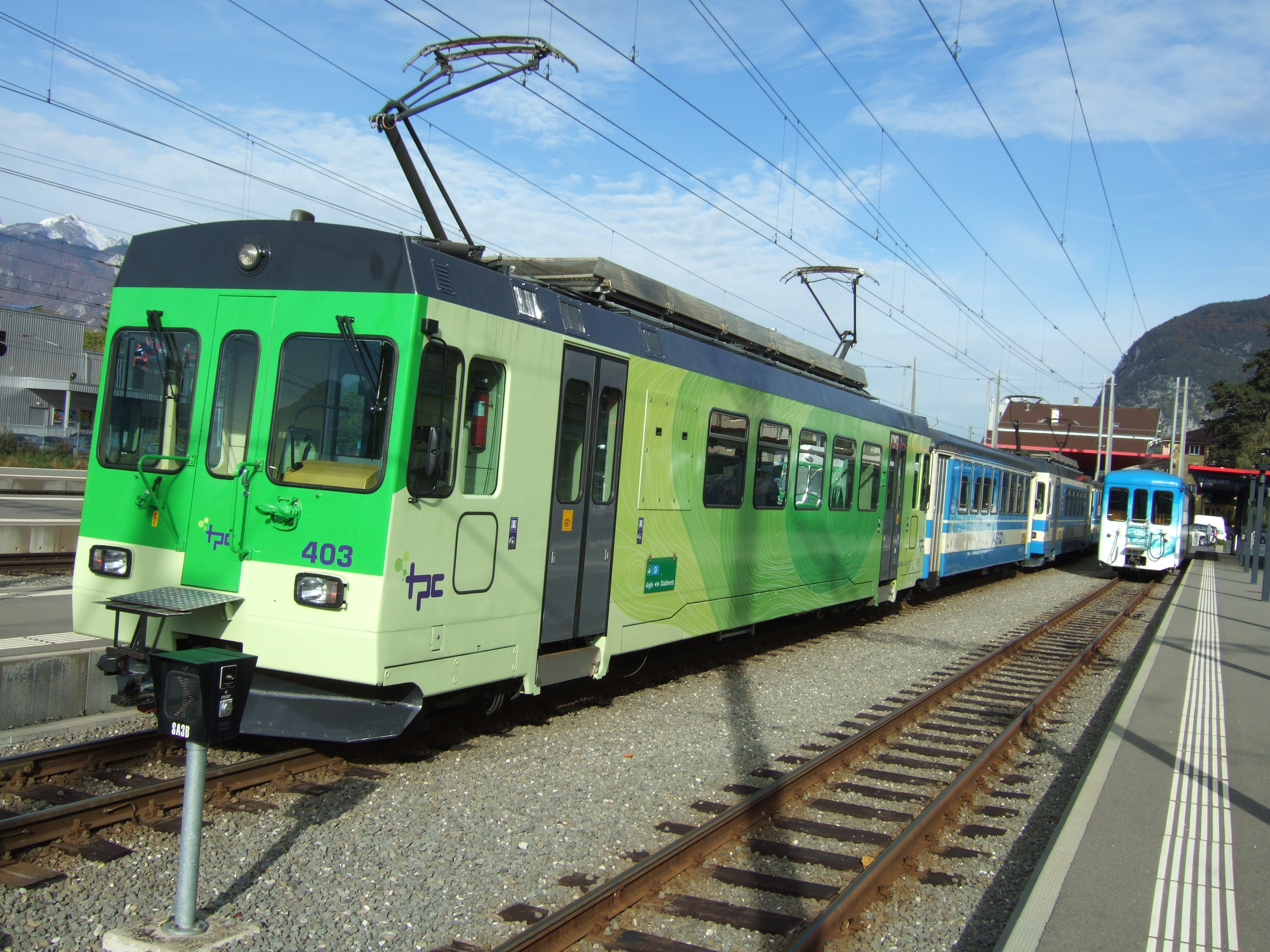 Photo: Trams aux Fils prise le vendredi 22-10-2010. En gare d'Aigle. Voici la nouvelle couleur des trains de l'A.S.D. Train composé de la motrice 403, de la voiture pilote 432, de la motrice 402 et de la voiture pilote 434. La motrice 403 n'a pas été accidentée, elle était en révision avant l'accident.La voiture pilote 432 en composition avec la motrice 404 le jour de l'accident a été réparée au dépôt de Chalex, par les employés de la compagnie, heureusement, elle a gardé son ancienne couleur bleue. Autre informations, les motrices 401 et 404 ainsi que la voiture pilote 431 aussi accidentées sont parties chez Bombardier à Villeneuve pour réparations, la surprise sera la couleur, bleue où vert ?. Pour les amateurs de photos, les T.P.C. ont fait venir le 05-10-2010, de la compagnie Lausanne Échallens Bercher, la motrice 26 et la voiture pilote 51, actuellement, cette composition circule sur la ligne. (C'est historique même si une autre motrice du L.E.B. la no 21 avait déjà circulé sur la ligne A.S.D. il y a plusieurs années). Avant la venue de la composition, de la compagnie Lausanne Échallens Bercher, c'est la motrice 302 et la voiture pilote 351 de l'Aigle Leysin qui circulait en renfort sur la ligne.